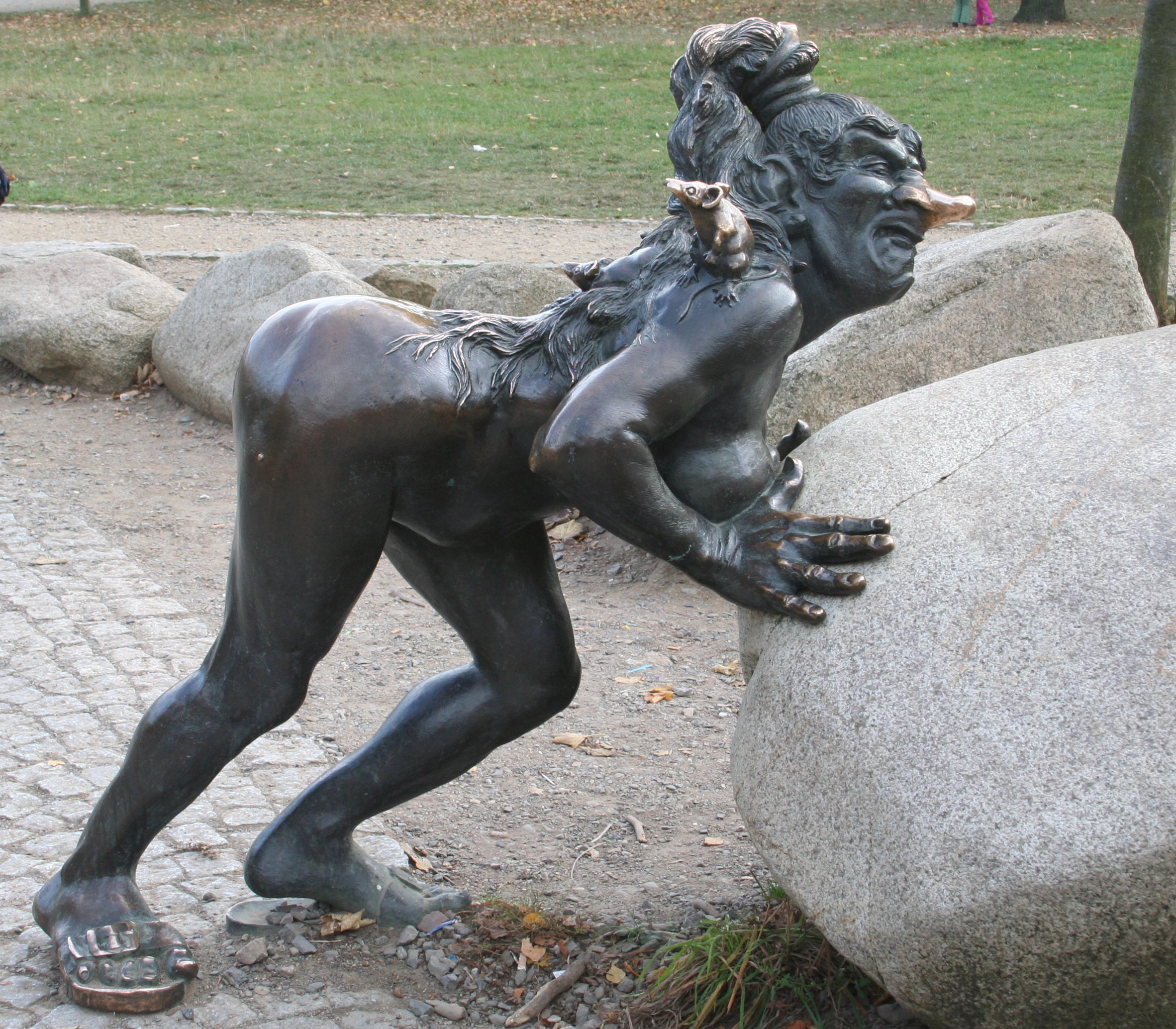 Hexenskulptur auf dem Hexentanzplatz in Thale/Sachsen-Anhalt